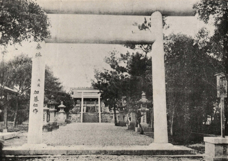 台灣日治時期大溪神社